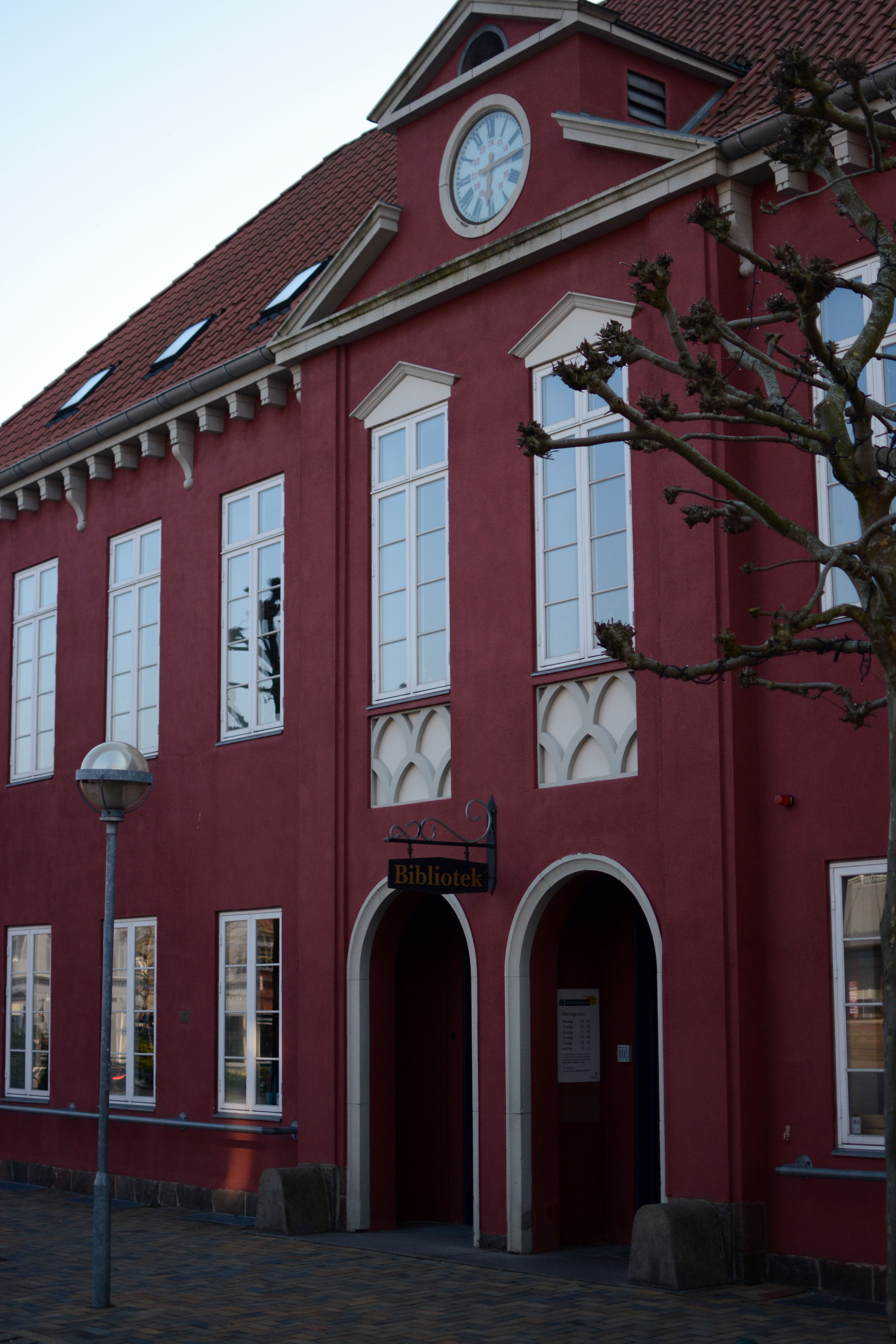 Ringe Bibliotek, set fra Ringe Torv